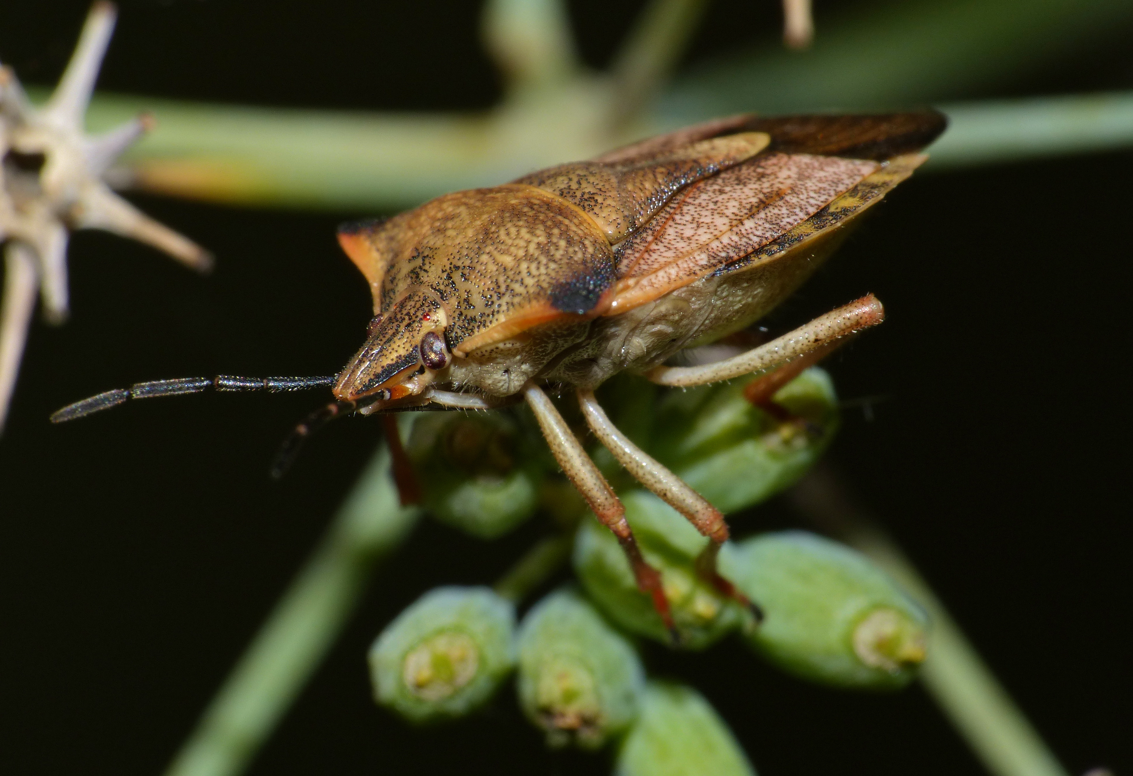 La Lieude, Mérifons, Hérault, FRANCE